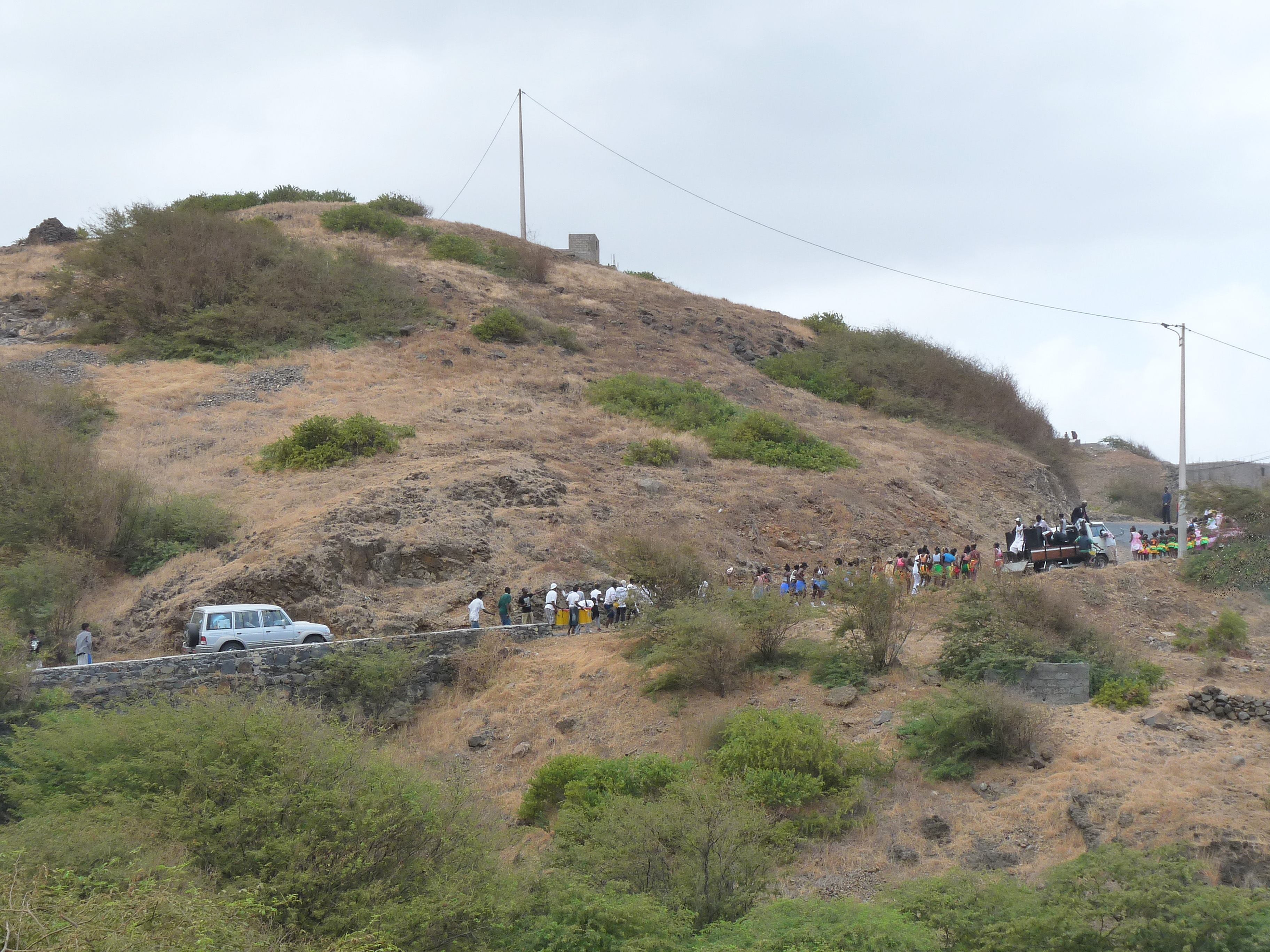 Au nord de l'île de Santiago (Cap-Vert) : cortège de Carnaval près de Porto Formoso, sur la route côtière qui relie Achada de Monte à Tarrafal